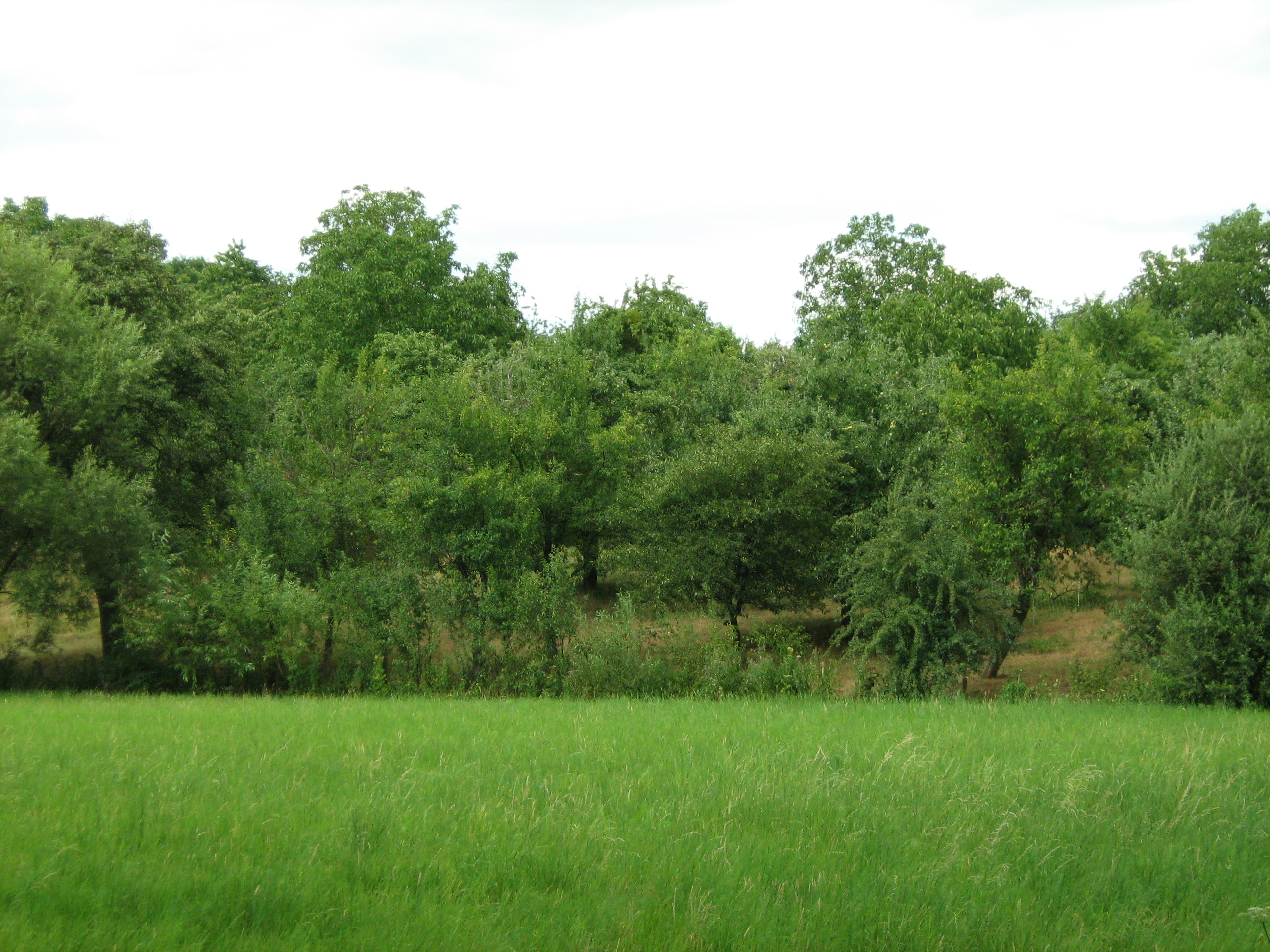 Vue sur une colline à l'arrière d'Alteckendorf